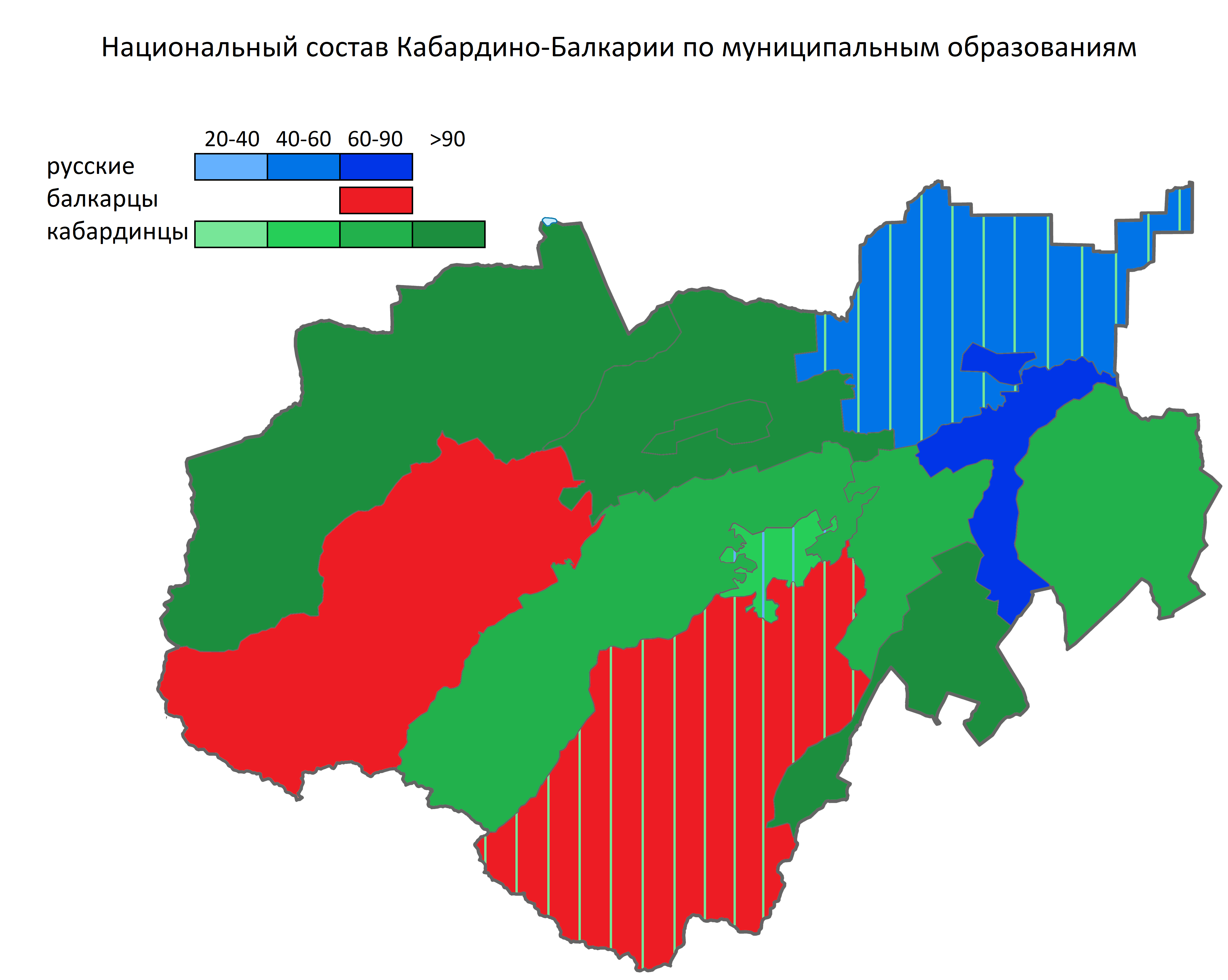 Население Кабардино-Балкарии по муниципальным образованиям по данным переписи населения 2010 г.